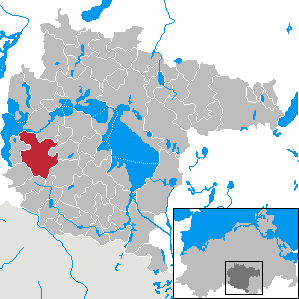 Fünfseen in Mecklenburg-Western Pomerania - District Müritz